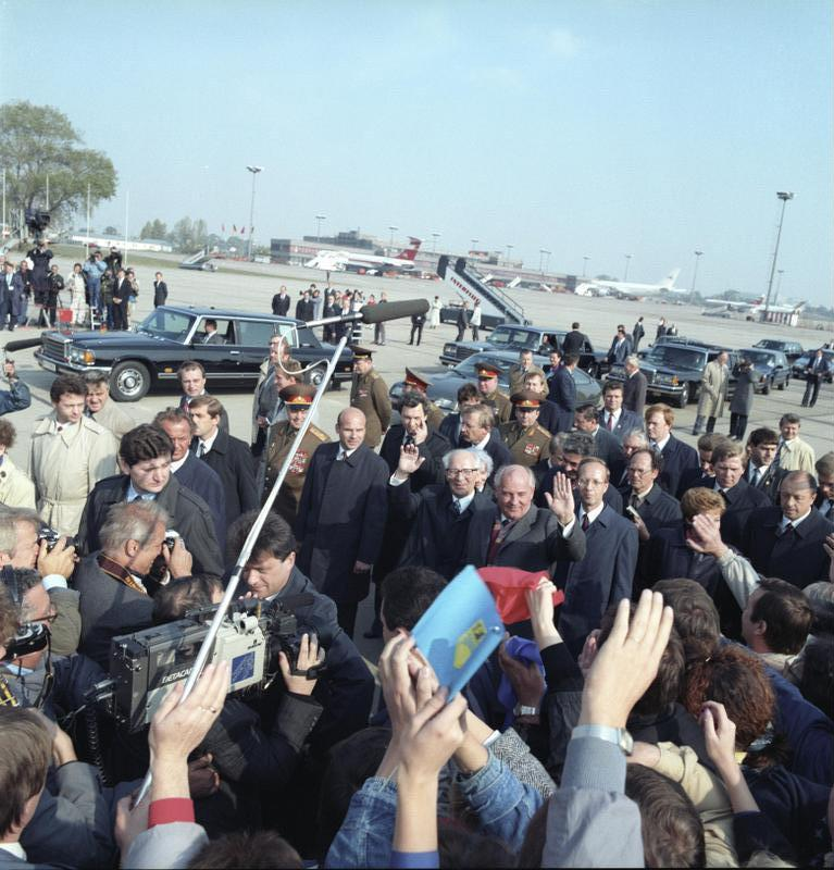 ADN-ZB/Schindler/6.10.89/bar/ Berlin: 40. Jahrestag DDR / Ankunft Gorbatschow/ Der Generalsekretär des ZK der KPdSU und Vorsitzende des Obersten Sowjets der UdSSR, Michail Gorbatschow, ist zur Teilnahme an den Feierlichkeiten zum 40. Jahrestag der DDR in Berlin eingetroffen. Er wurde auf dem Flughafen Berlin-Schönefeld herzlich vom Generalsekretär des ZK der SED und Vorsitzenden des Staatsrates der DDR, Erich Honecker, begrüßt.